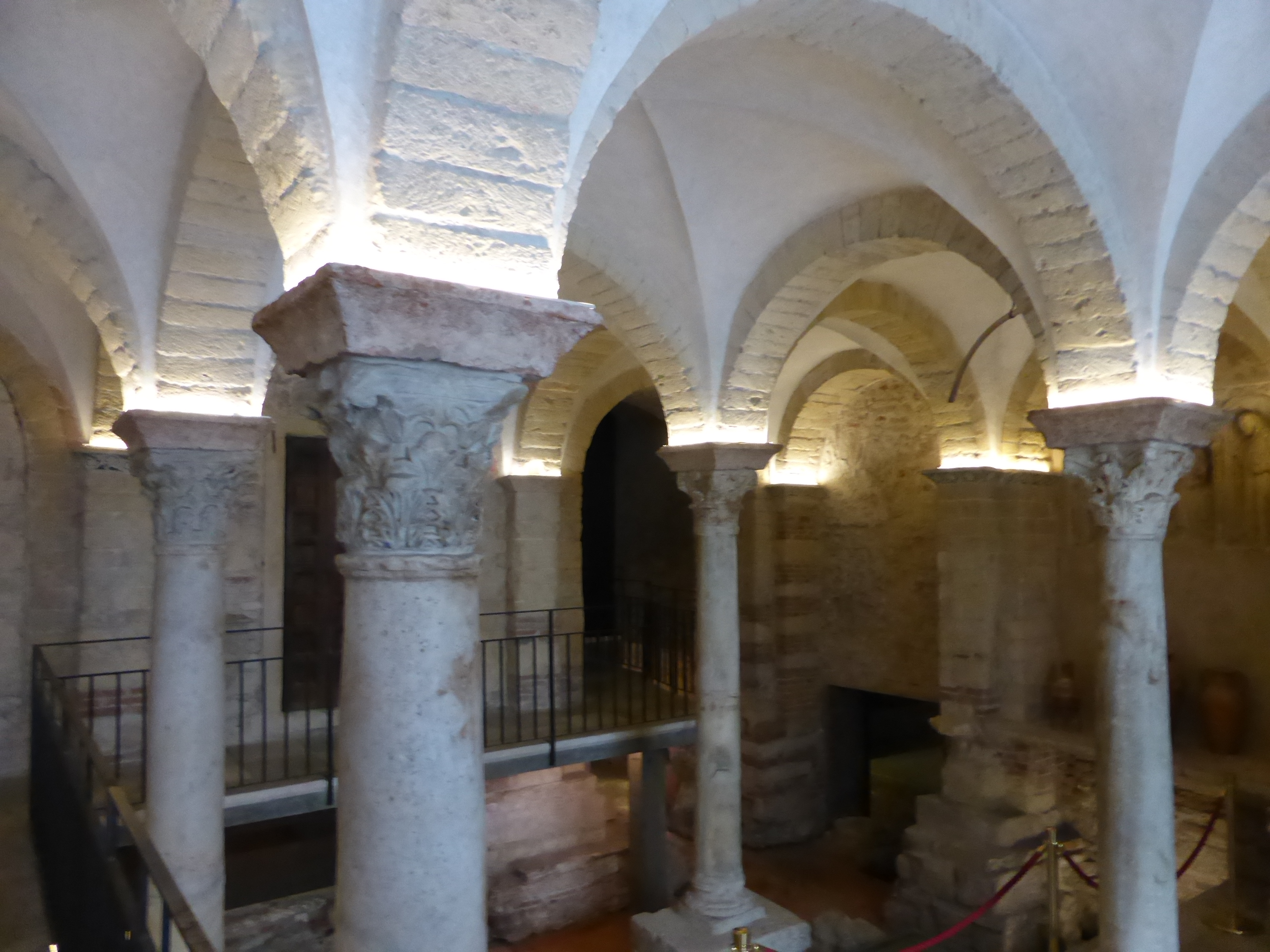 Domherrenkreuzgang des Doms von Verona